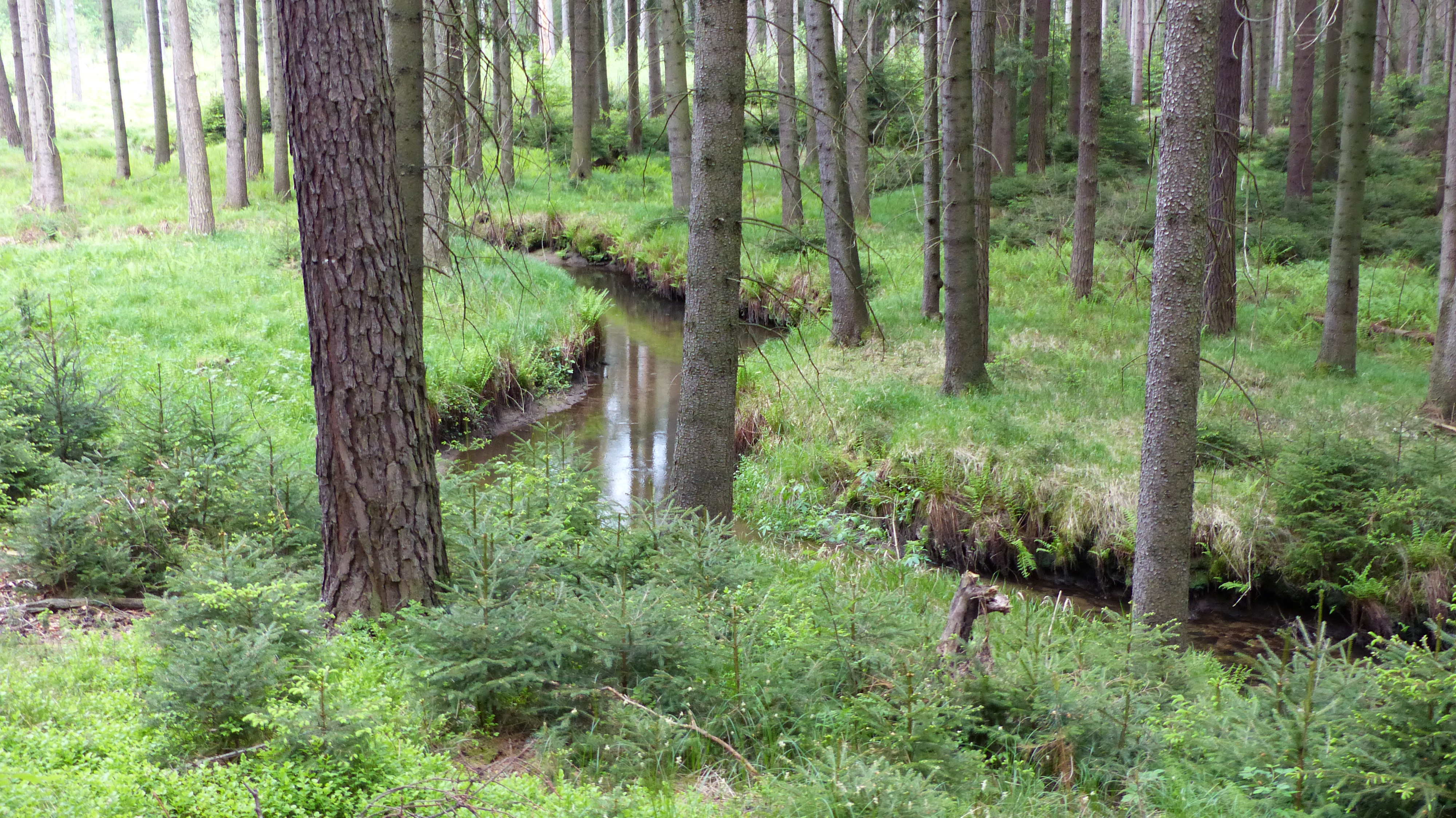 FFH Prießnitzgrund, Dresdner Heide, Dresden